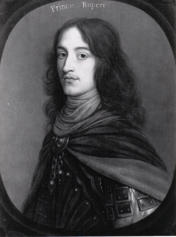 Ruprecht von der Pfalz, Herzog von Cumberland